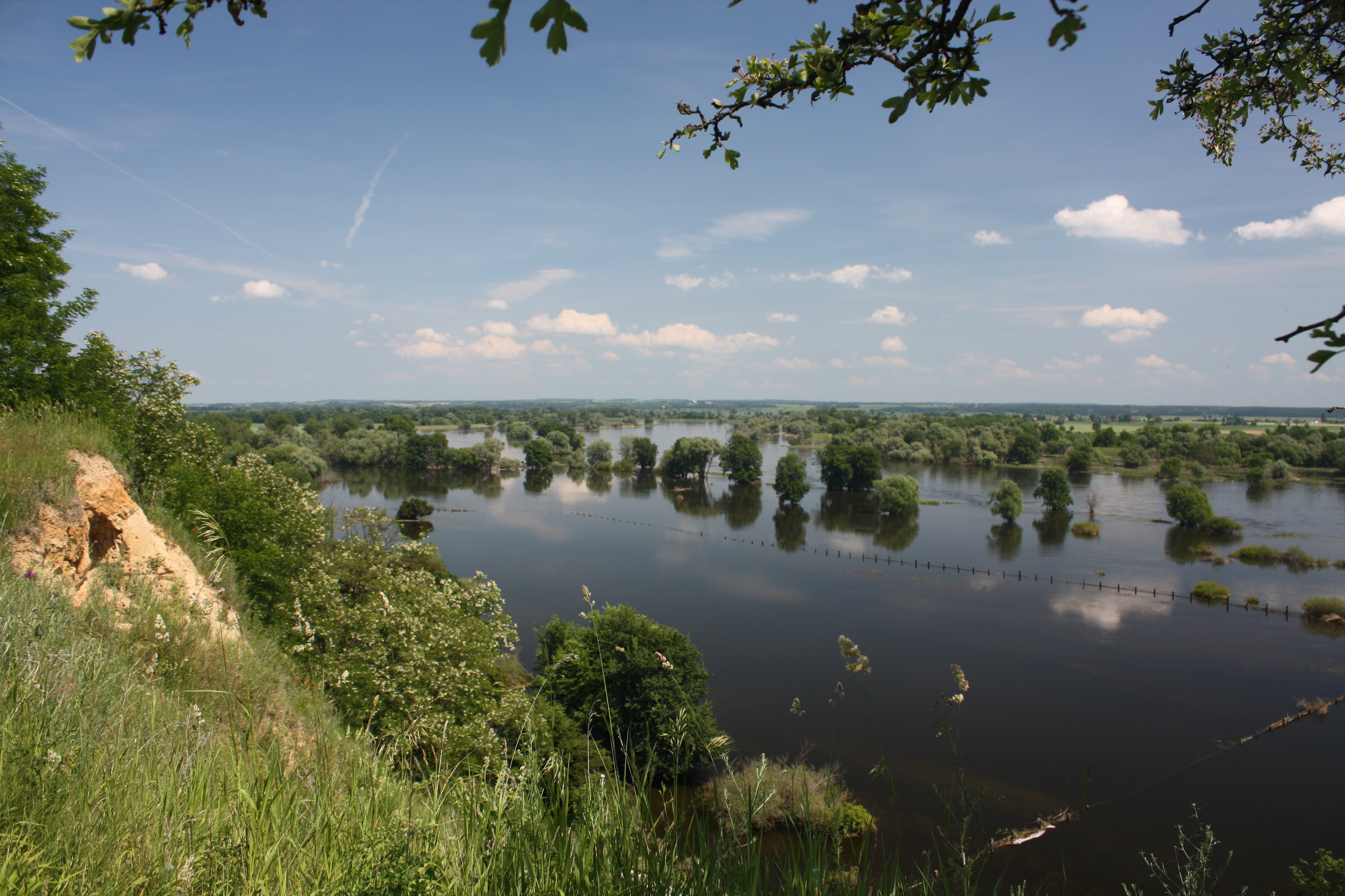 Hochwasser am NSG „Oderberge“ (links) Lebus. Während der häufigen Sommerhochwässer stehen die Auenwiesen der Oder wochenlang unter Wasser. Bereich der Oder hier im FFH-Gebiet DE-3553-307 „Lebuser Odertal“.